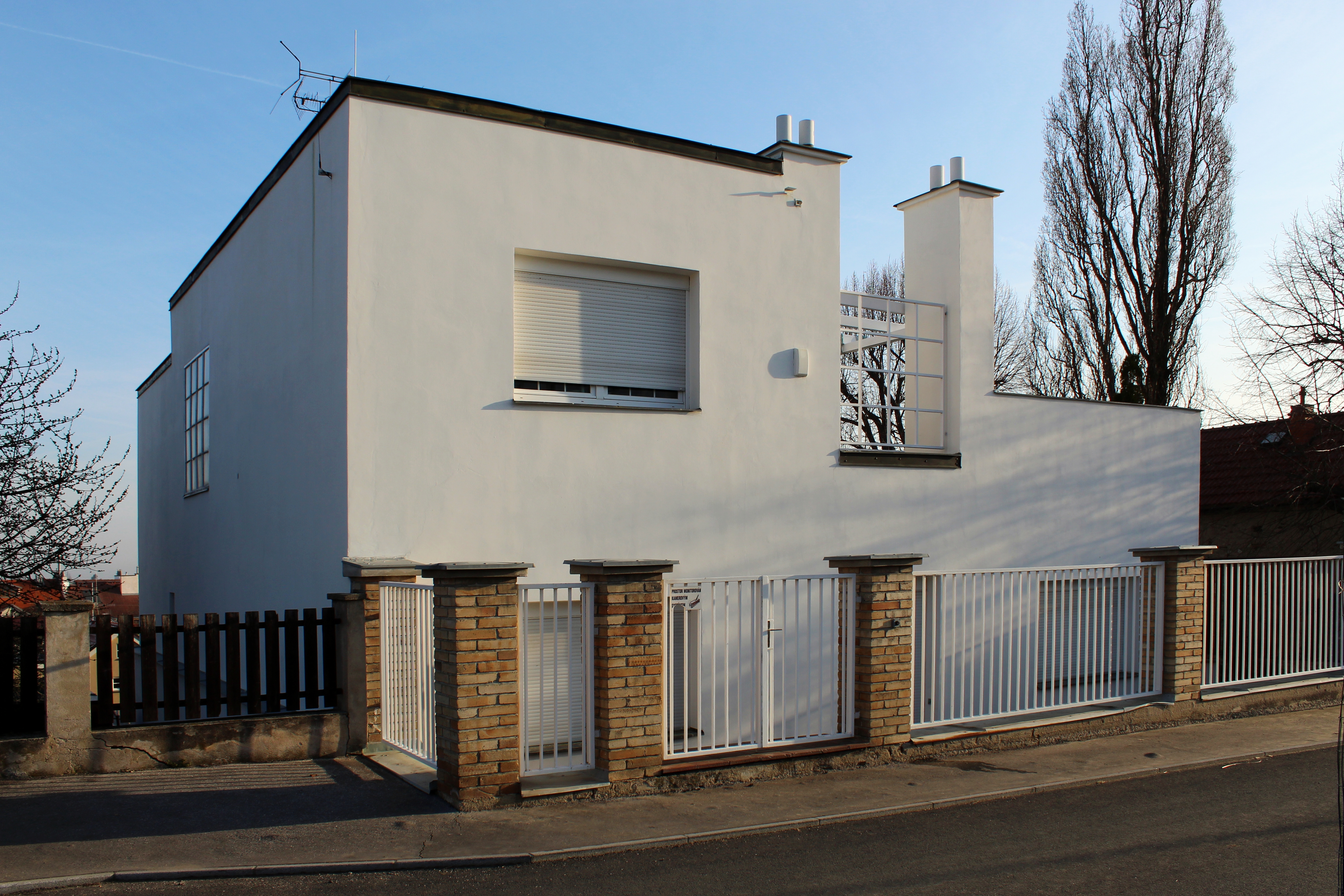 Praha